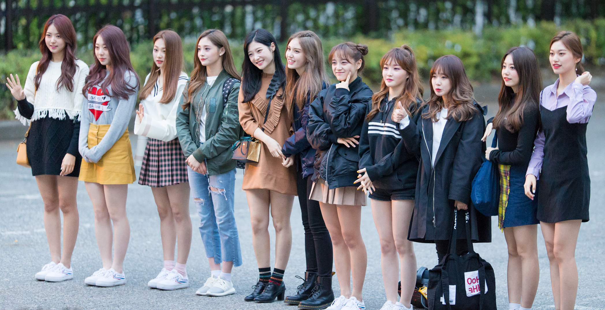 I.O.I el 21 de octubre en Music Bank